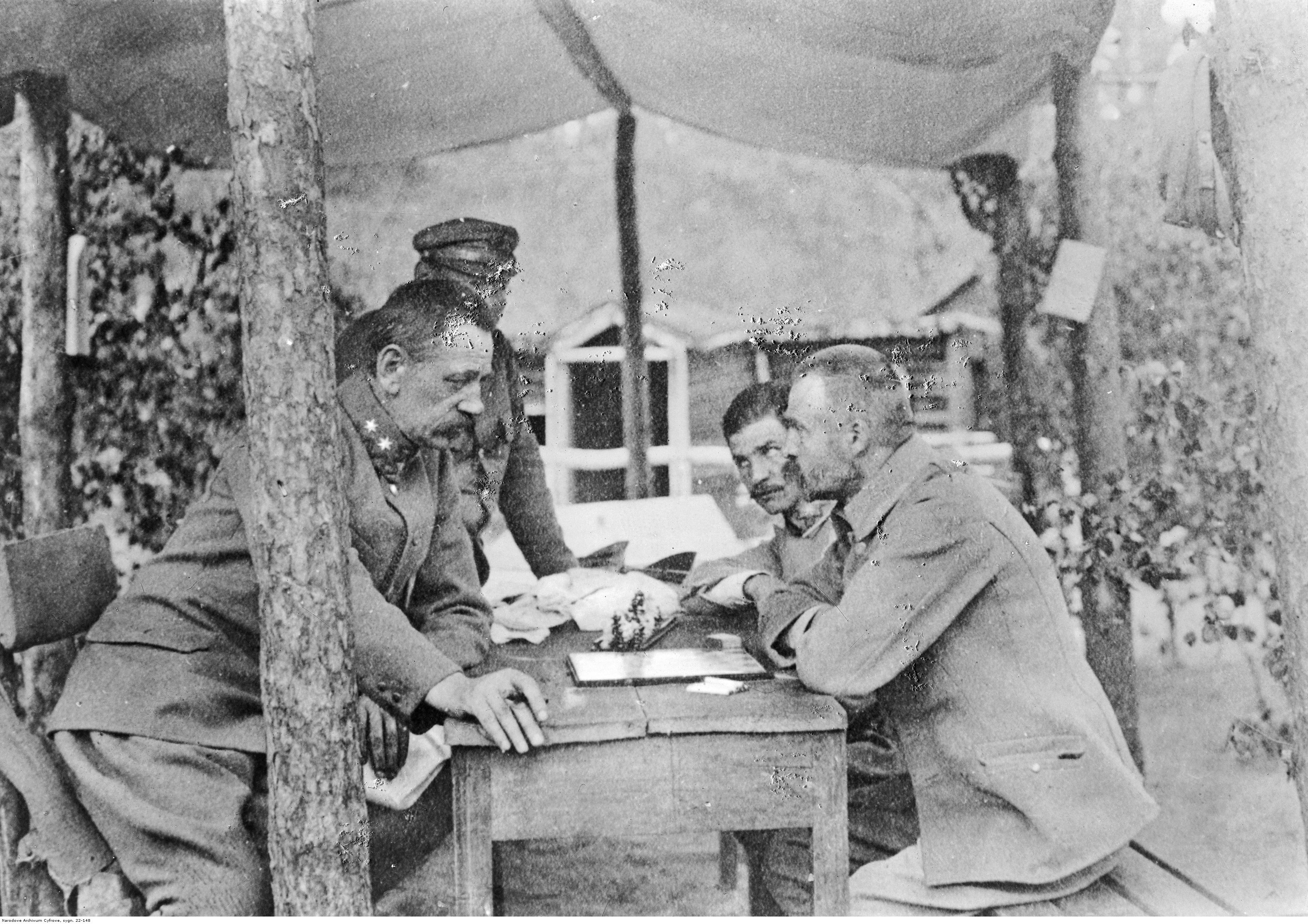 Józef Piłsudski gra w szachy z Jędrzejem Moraczewskim (1. z lewej) w Wołczecku. Obok widoczny oficer Legionów Polskich, rotmistrz Władysław Belina-Prażmowski (2. z lewej, za Piłsudskim).